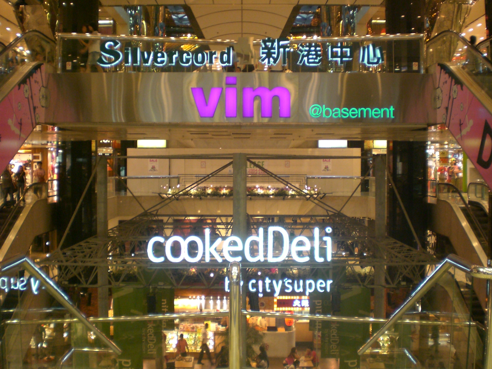 新港中心, 廣東道&海防道